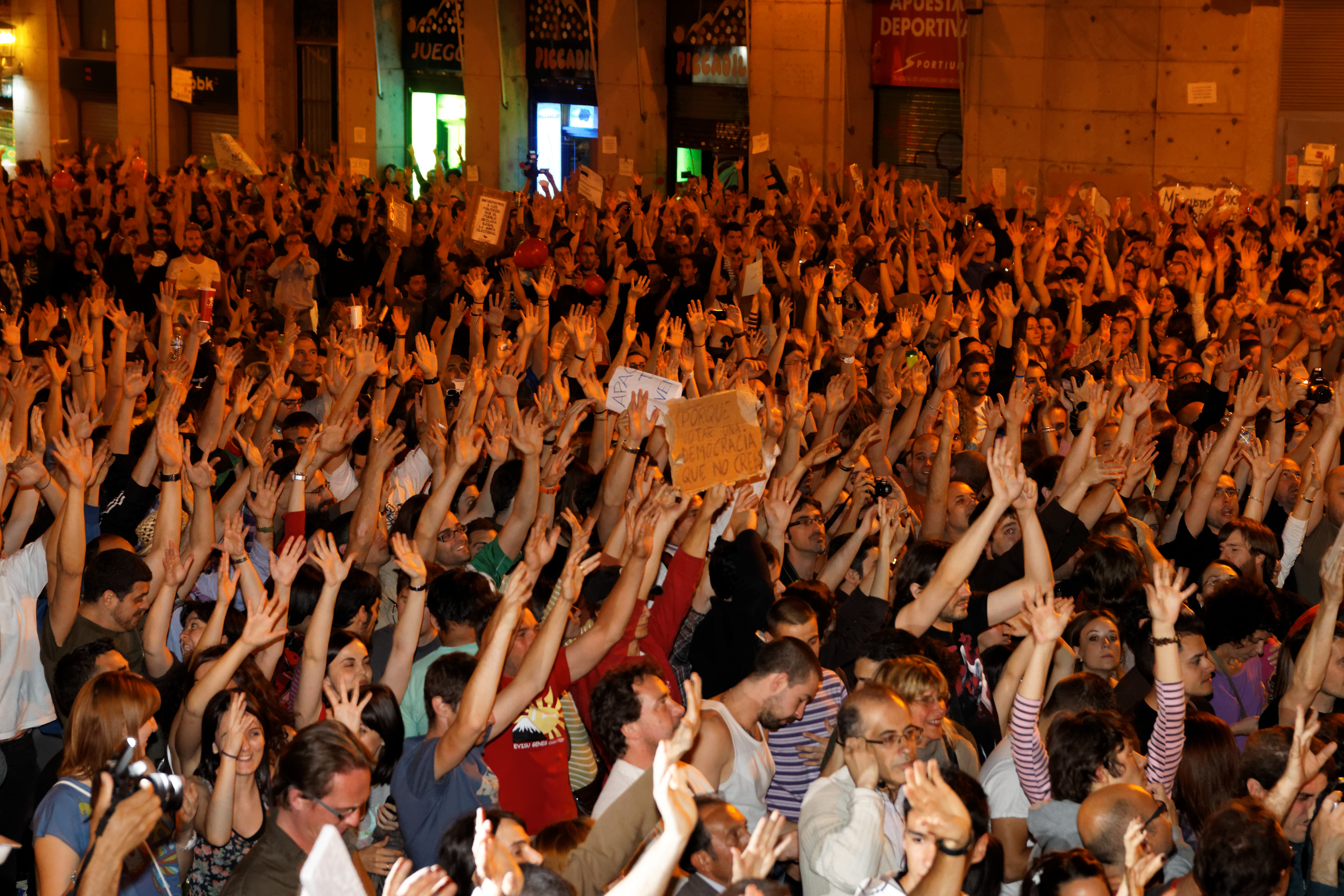 Manifestantes. Acampada Sol. Puerta del Sol, Madrid.